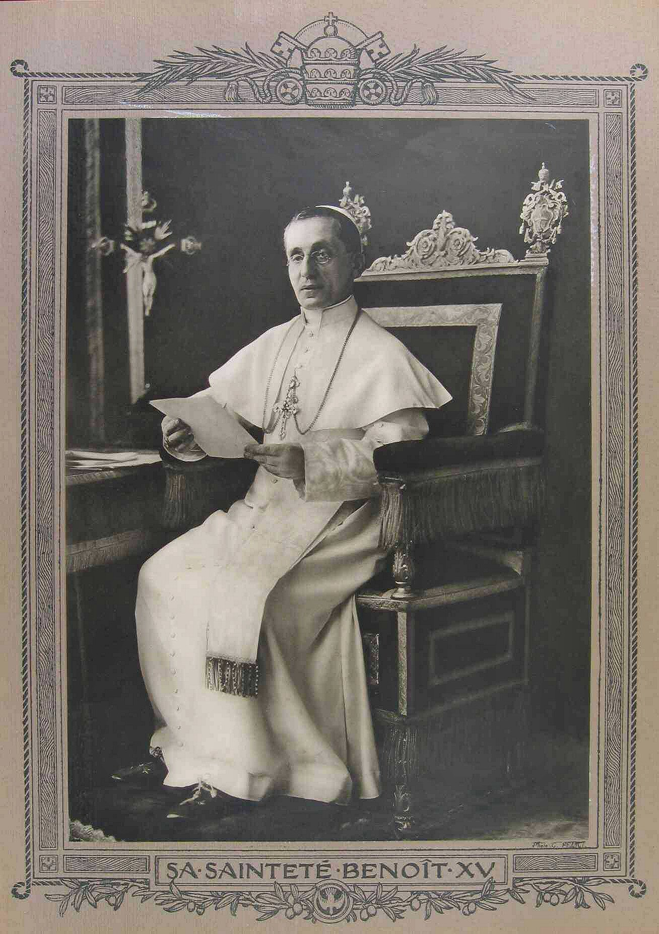 Sa Sainteté Benoît XV.